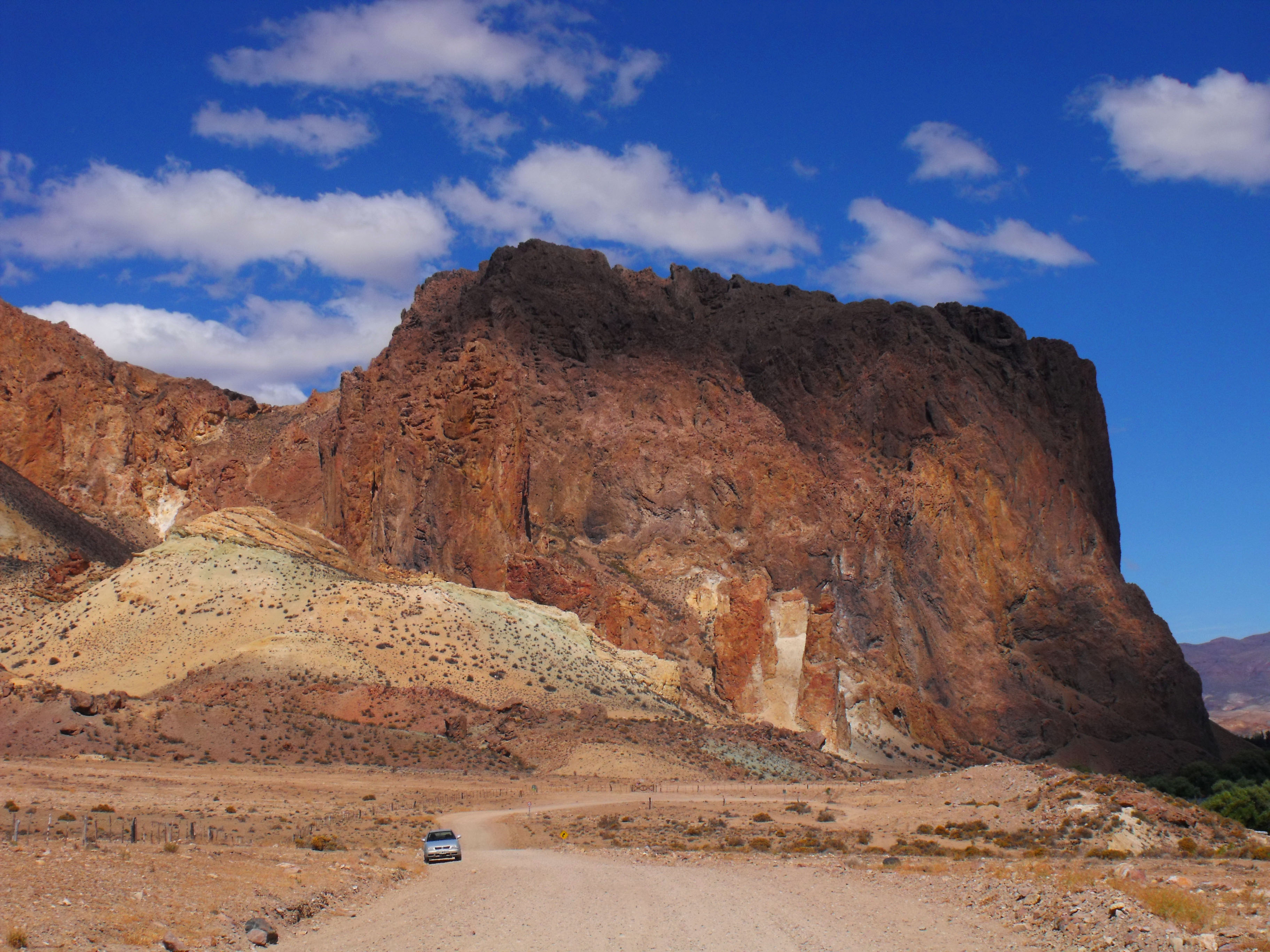 Gualjaina, Chubut